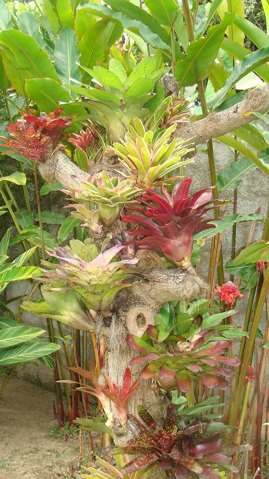 Variedades de bromelias cultivadas sobre un tronco seco en el jardín de una casa en Caracas (Venezuela)